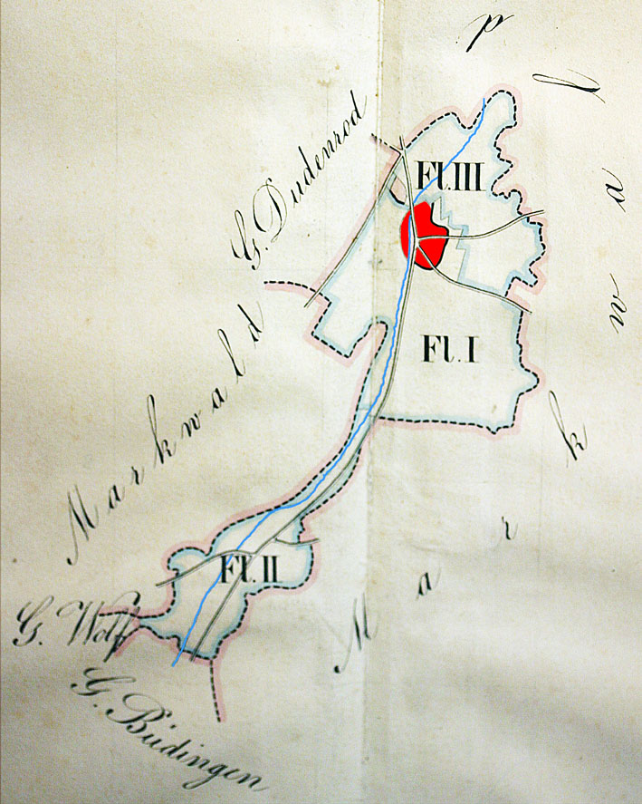 Grundrissskizze der Wildung Pferdsbach in Büdingen